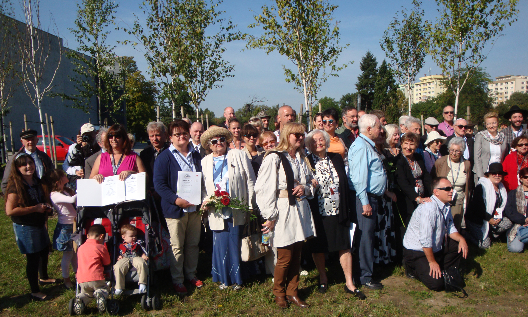 Ocaleli i goście uroczystości wręczenia certyfikatów nowych drzewek w Parku Ocalałych w Łodzi 29 sierpnia 2014 r.